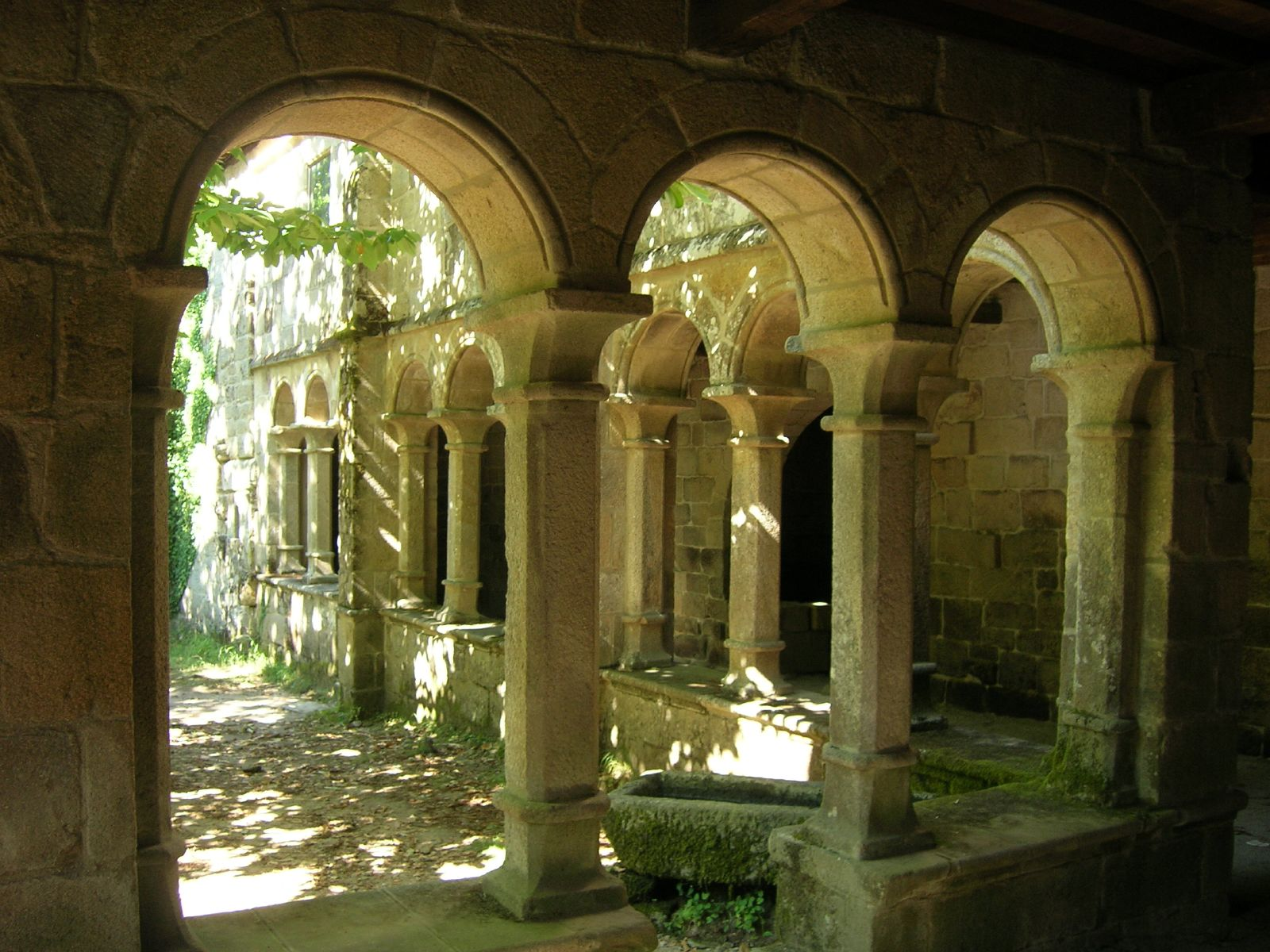 Mosteiro de Santa Cristina de Ribas do Sil, en Parada de SilMonasterio de Santa Cristina de Ribas do Sil